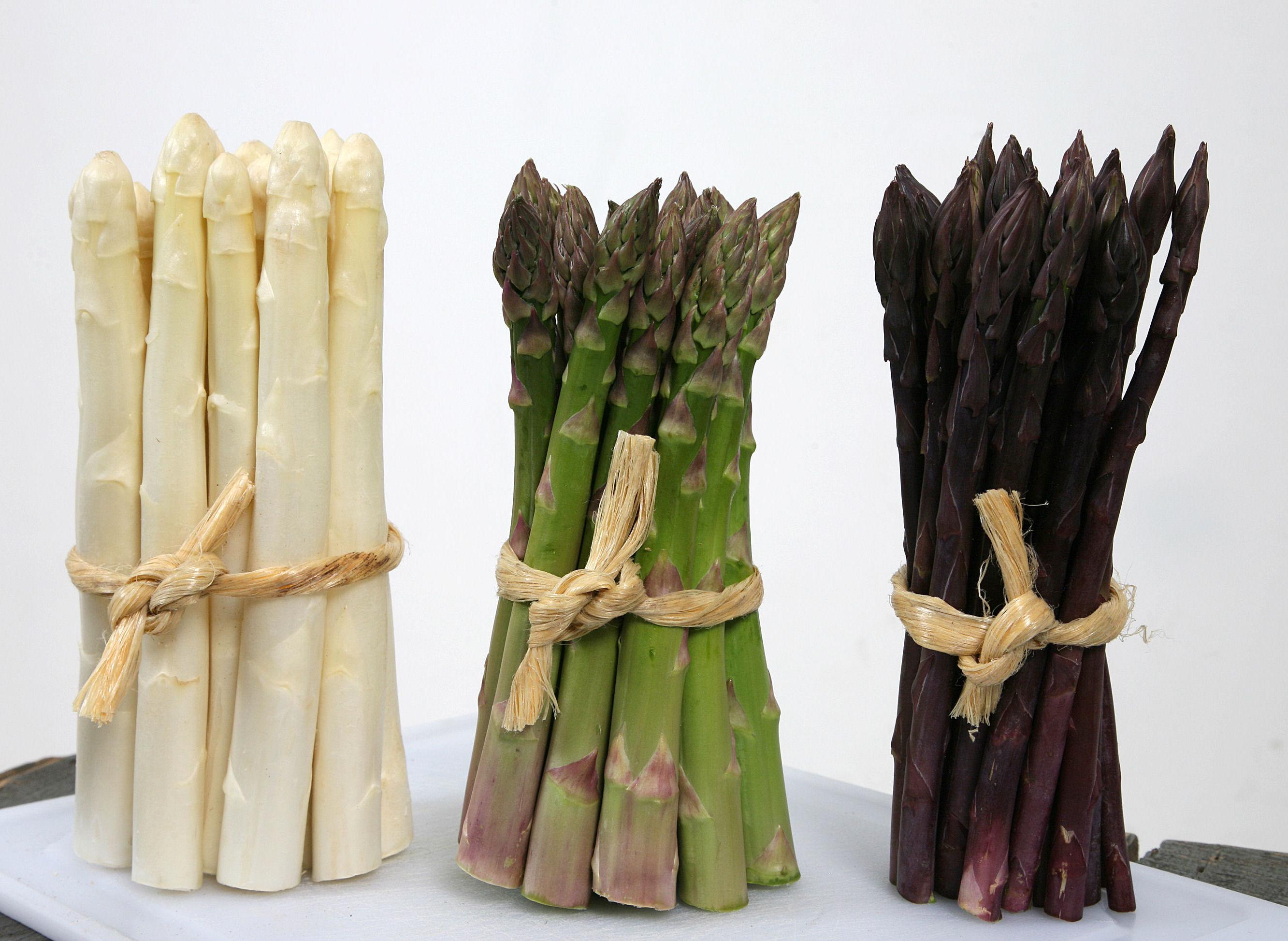 Aceera Nederlandse asperge wit groen paars